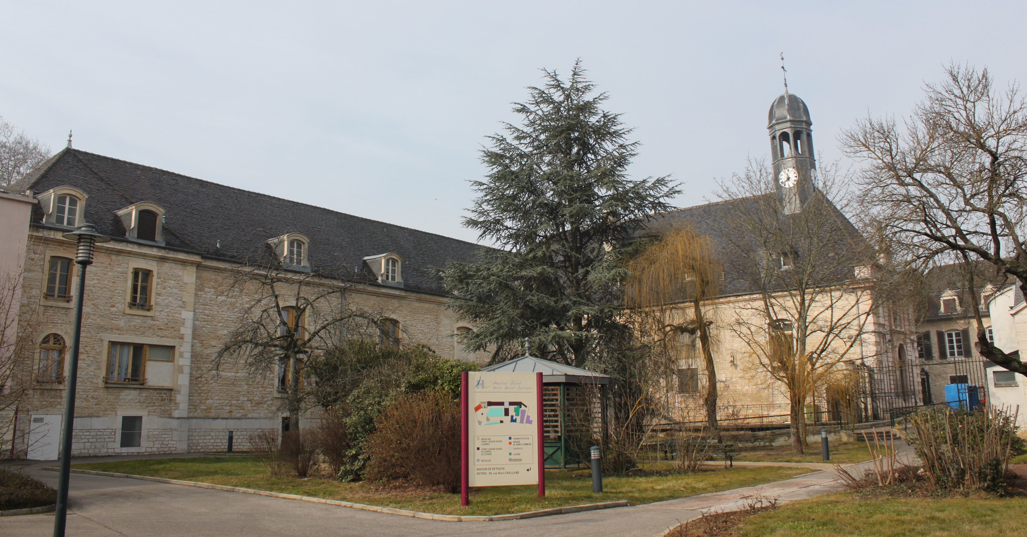 Nuits-Saint-Georges, Bourgogne, France